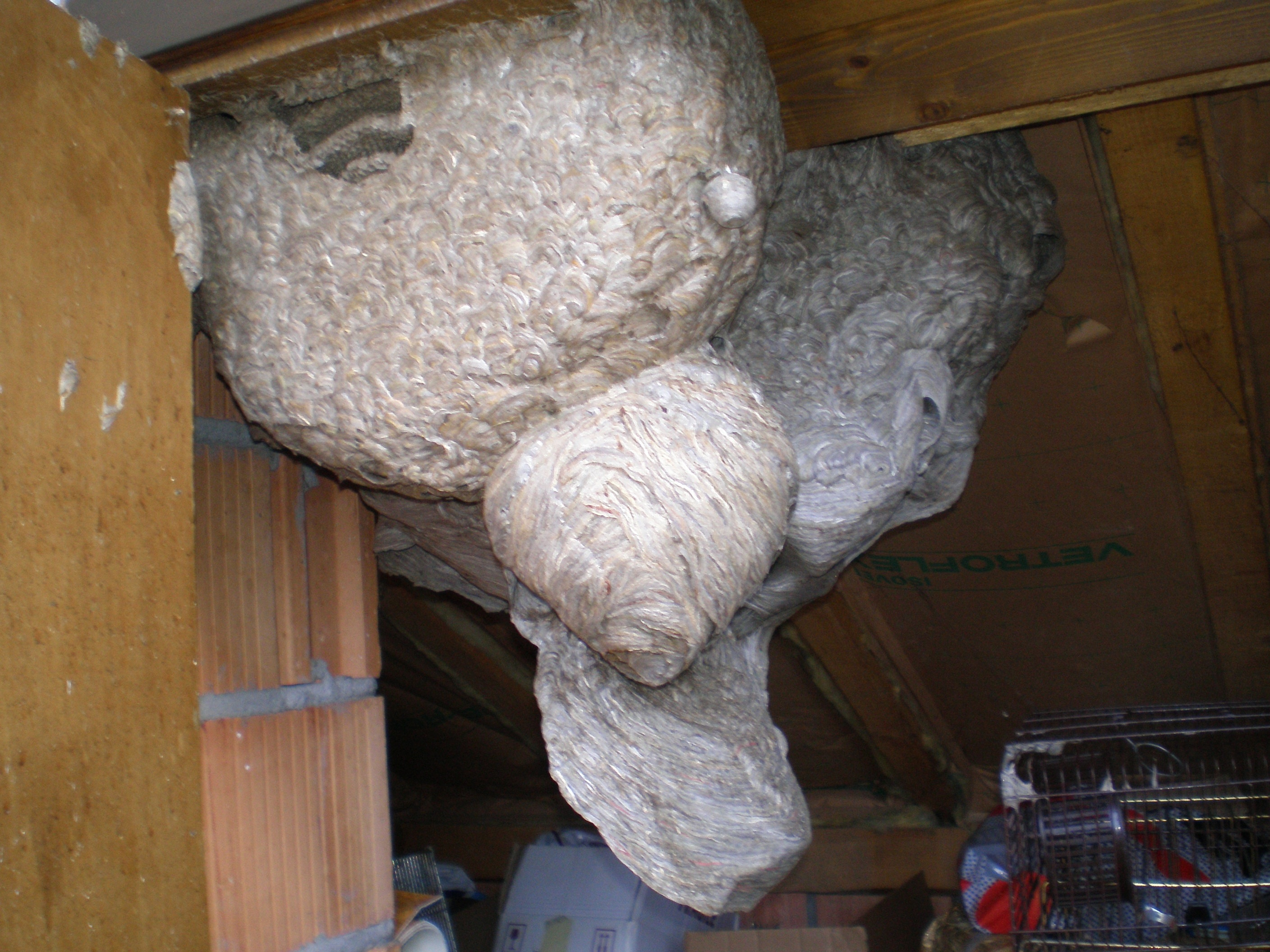 Wespennest auf dem Dachboden in Malters (CH)